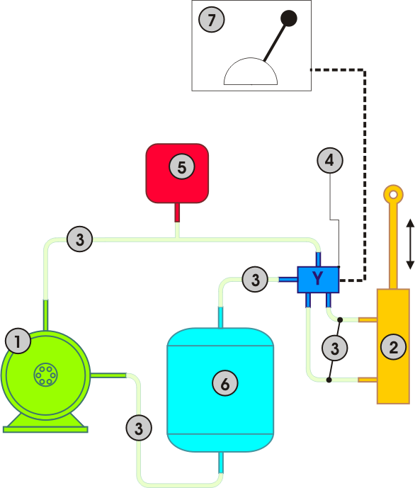 Kategória:Obrázky schém